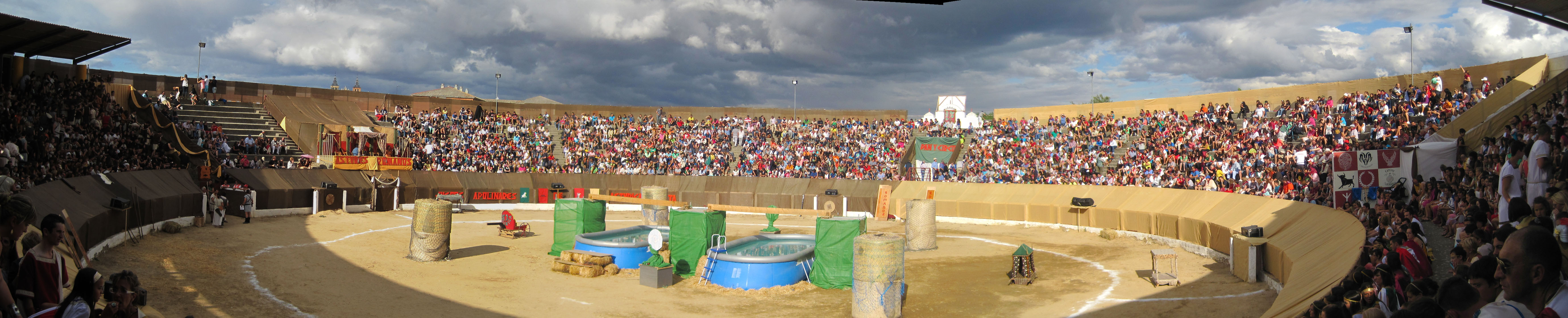 Plaza de toros de Astorga (León, España) momentos antes de celebrarse el circo romano, durante las fiestas de astures y romanos 2013.